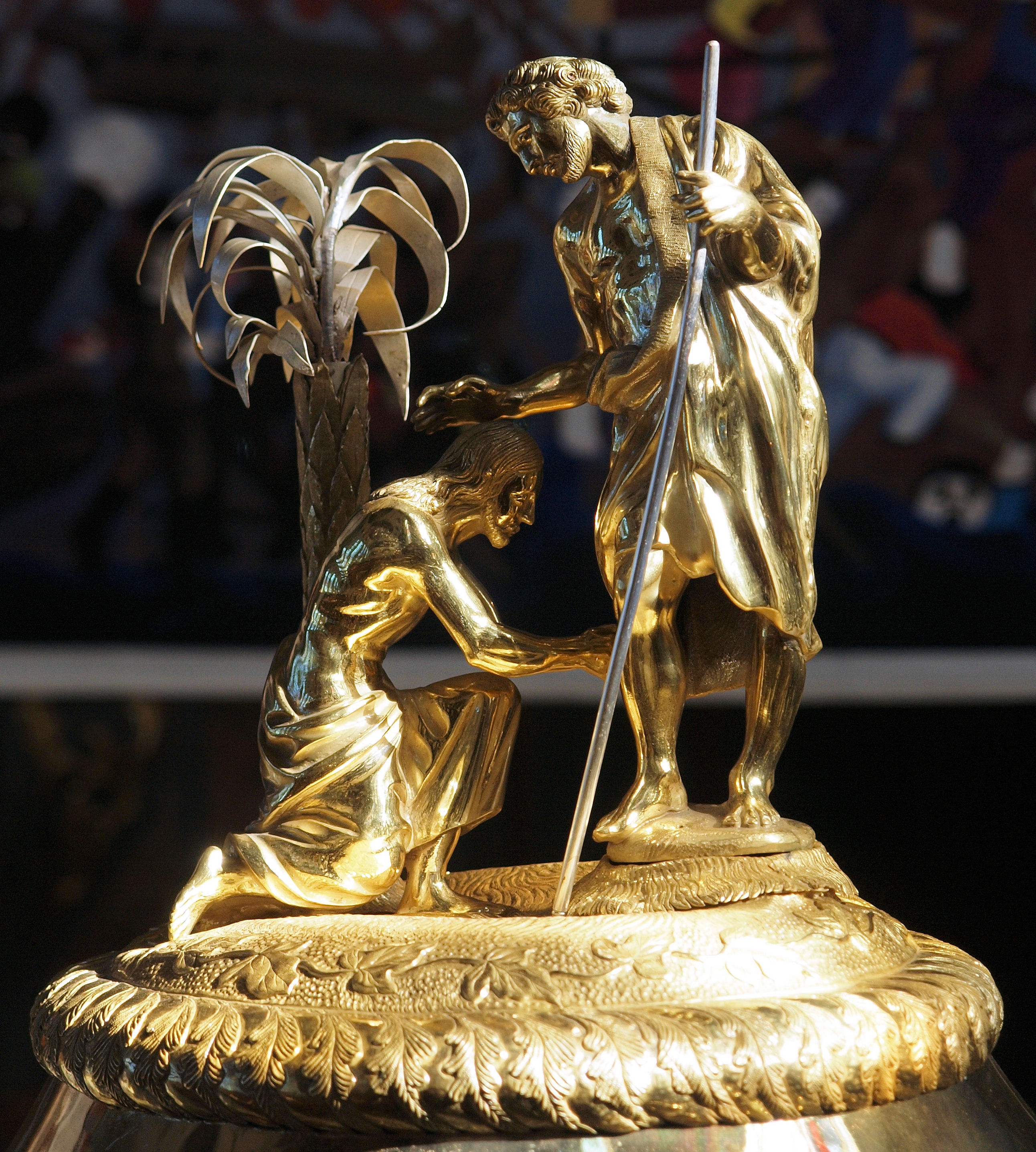 Der Deckelschmuck des Taufsteins der Pfarrkirche St. Mauritius in Appenzell. Der Runddeckel auf dem Taufstein aus dem 17. Jahrhundert, endstand im 1. Viertel des 19. Jahrhunderts. Er besteht aus teilweise vergoldetem Kupfer.